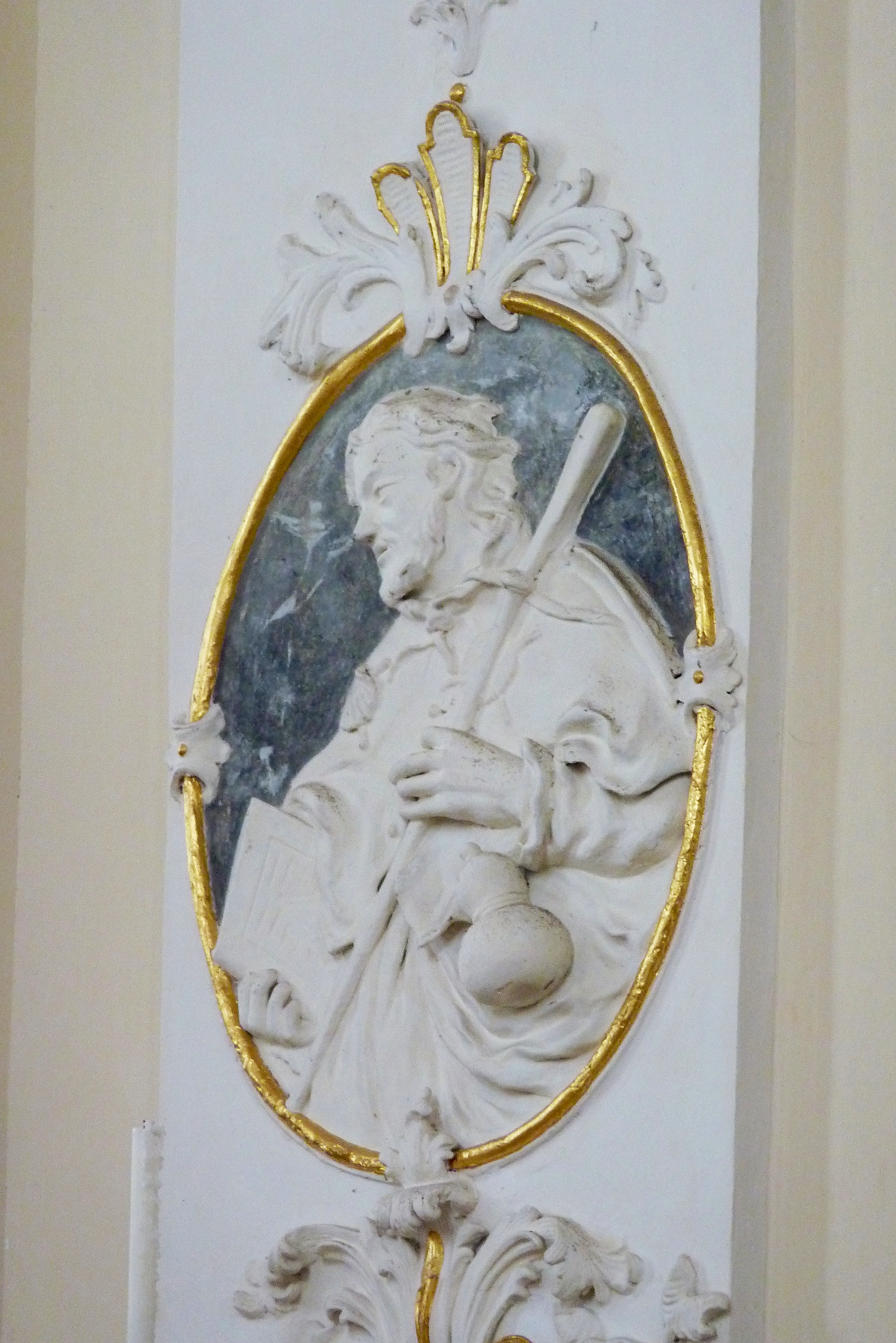 Katholische Pfarrkirche, ehemalige Kloster- und Wallfahrtskirchellfahrtskirche St. Leonhard in Unterliezheim, einem Ortsteil von Lutzingen im Landkreis Dillingen an der Donau (Bayern), Pilaster mit Stuckmedaillon